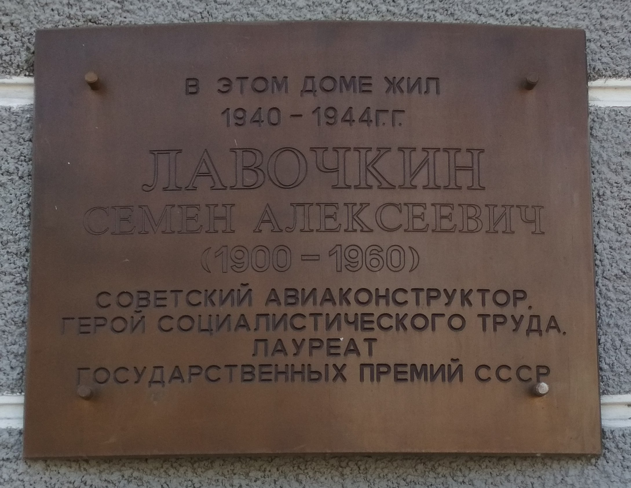 Мемориальная доска на доме № 16 по улице Чаадаева (Нижний Новгород), где С. А. Лавочкин в жил 1940—1944 годы, возглавляя ОКБ-21.